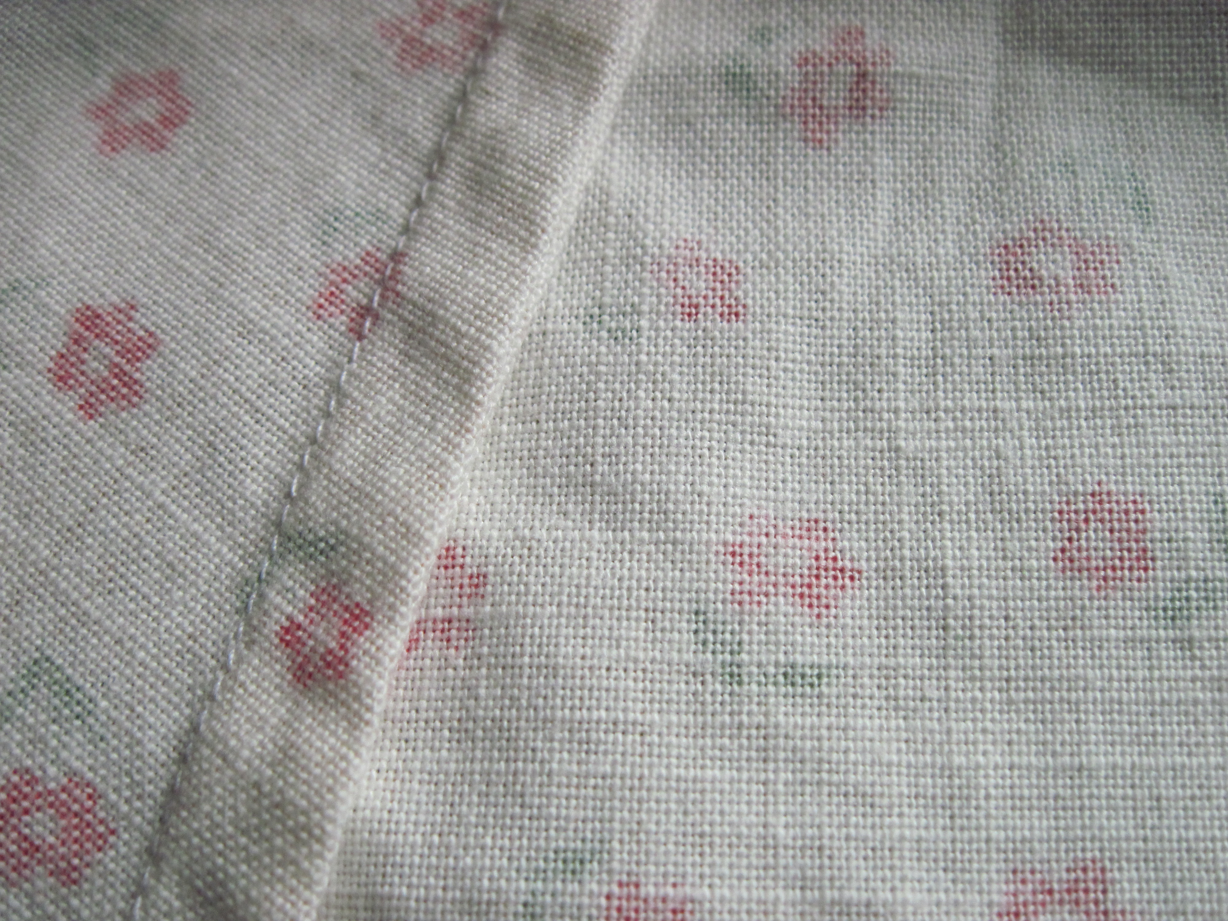 Eksempel på fransk søm